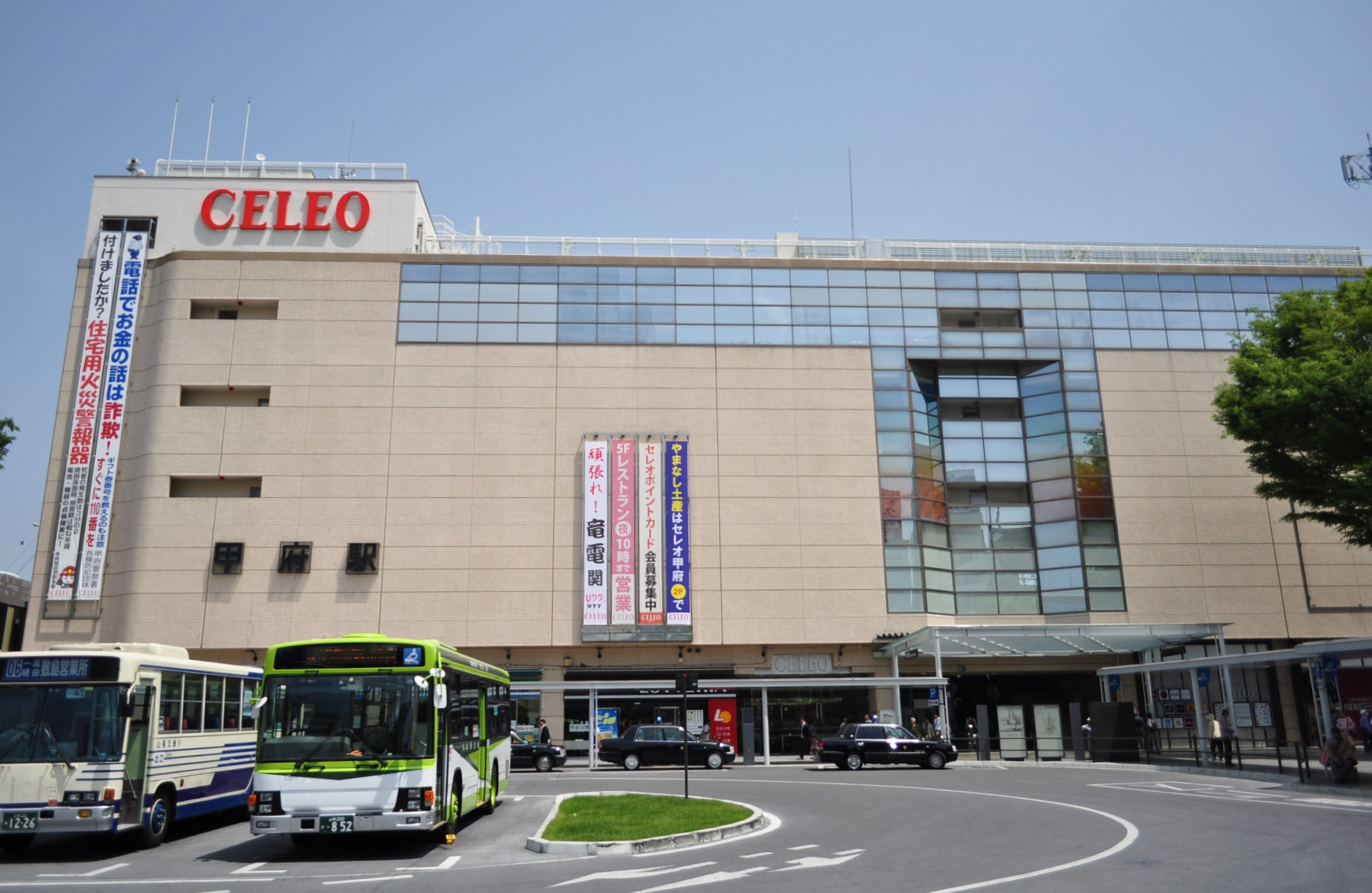 甲府駅南口